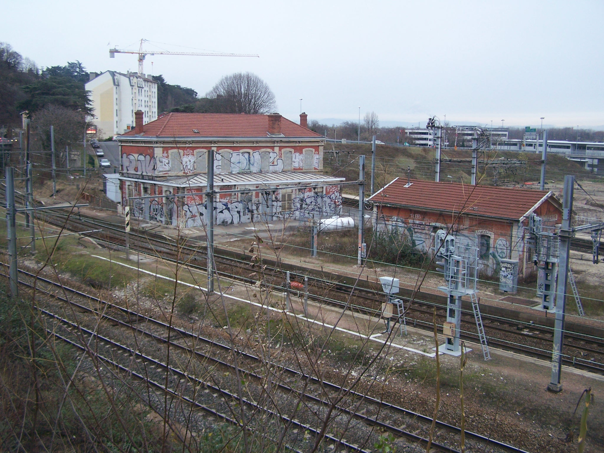 La gare de Lyon Saint Clair, fermée au public depuis 1981, dans le Rhône, France.